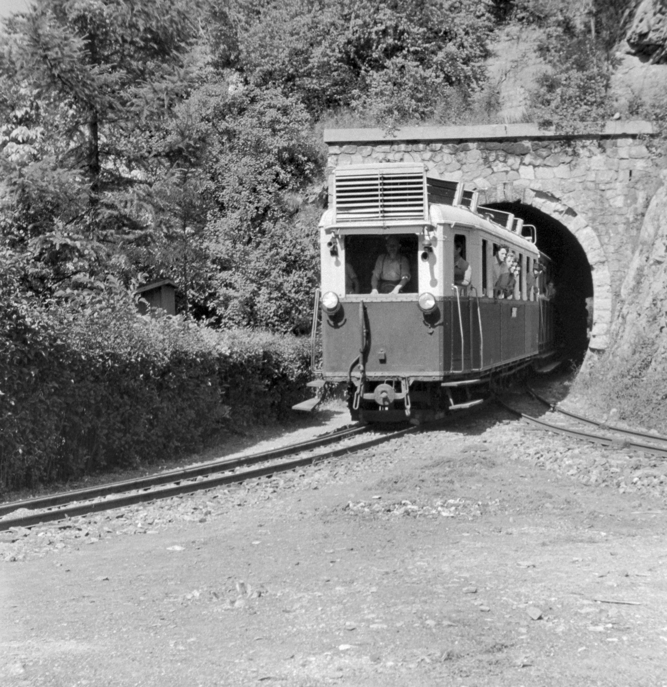 A Lillafüredi Állami Erdei Vasút 1928-ban gyártott Ganz-motorvonata érkezik Miskolc felől Lillafüredre az alagúton át.